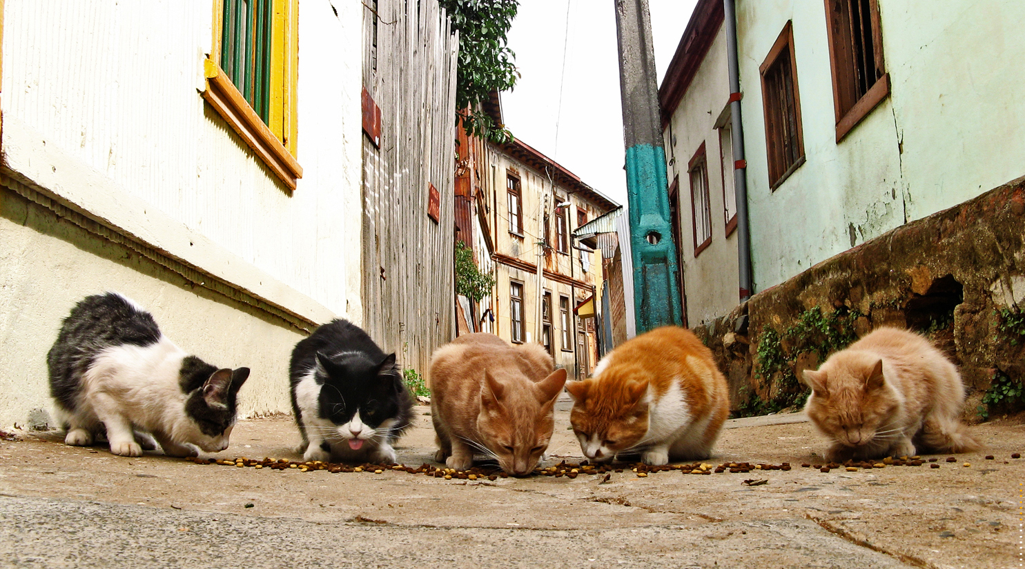 Somo o no somo!!!